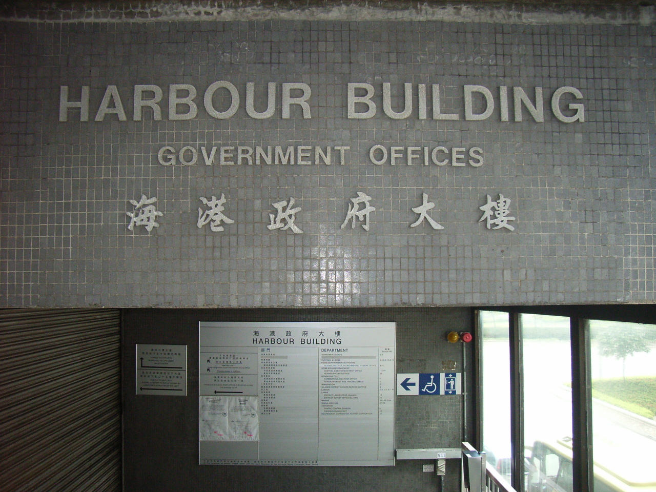 海港政府大樓, 香港中環統一碼頭道38號。 By KennethTom